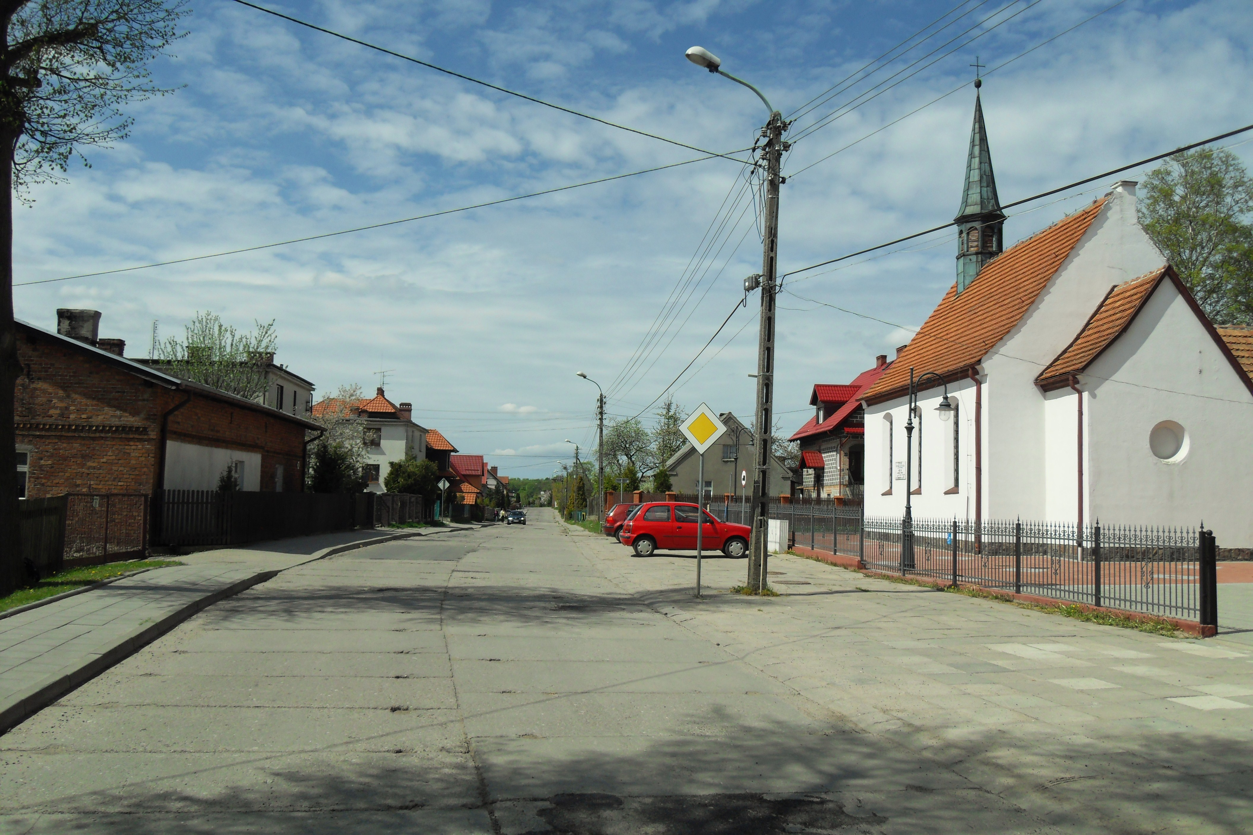 Gdańsk Kiełpino Górne, ul. Goplańska.